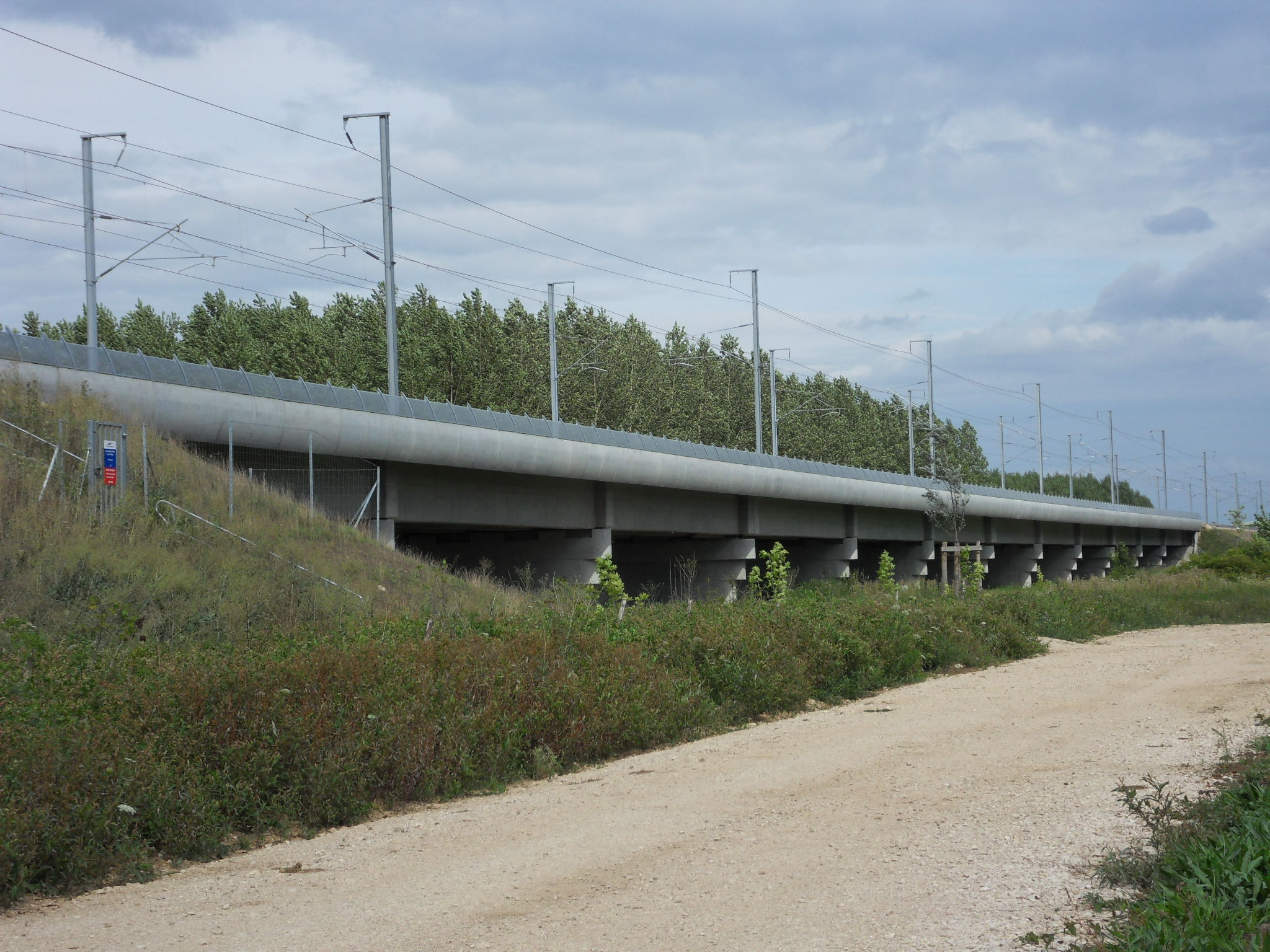 LGV Rhin-Rhône. Ouvrage de franchissement de la Saône. Une des trois estacades